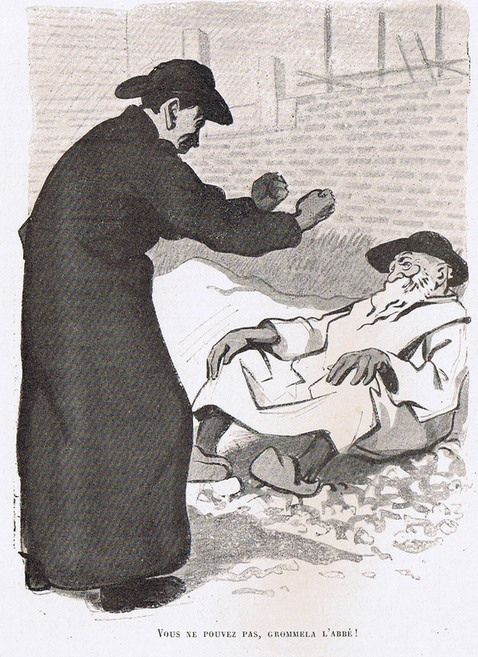 Illustration d'Hermann-Paul (1864-1940) pour le roman "L'Abbé Jules" d'Octave Mirbeau (1848-1917). Éditions Arthème Fayard, collection « Modern Bibliothèque », 1904.